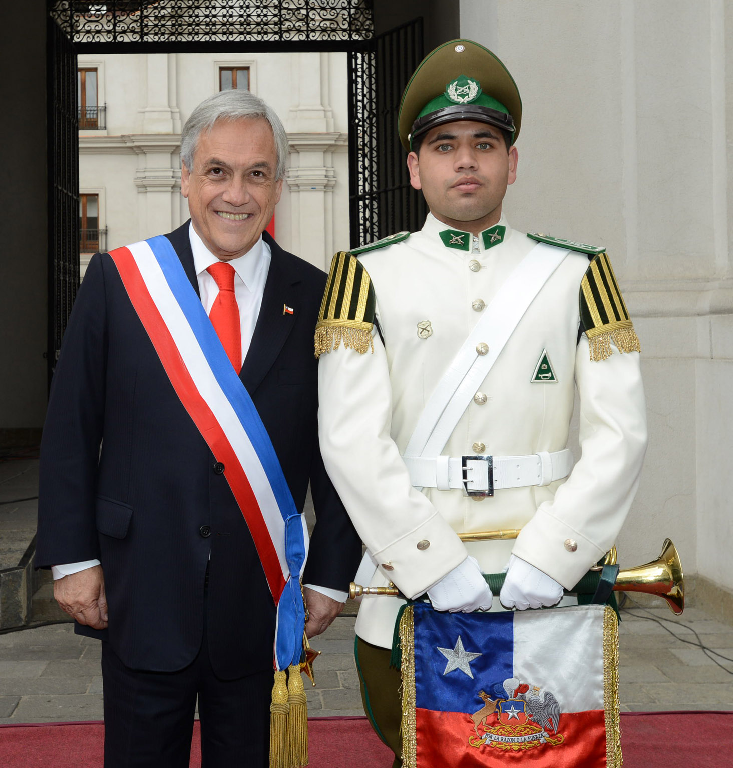 18-09-12 La Moneda